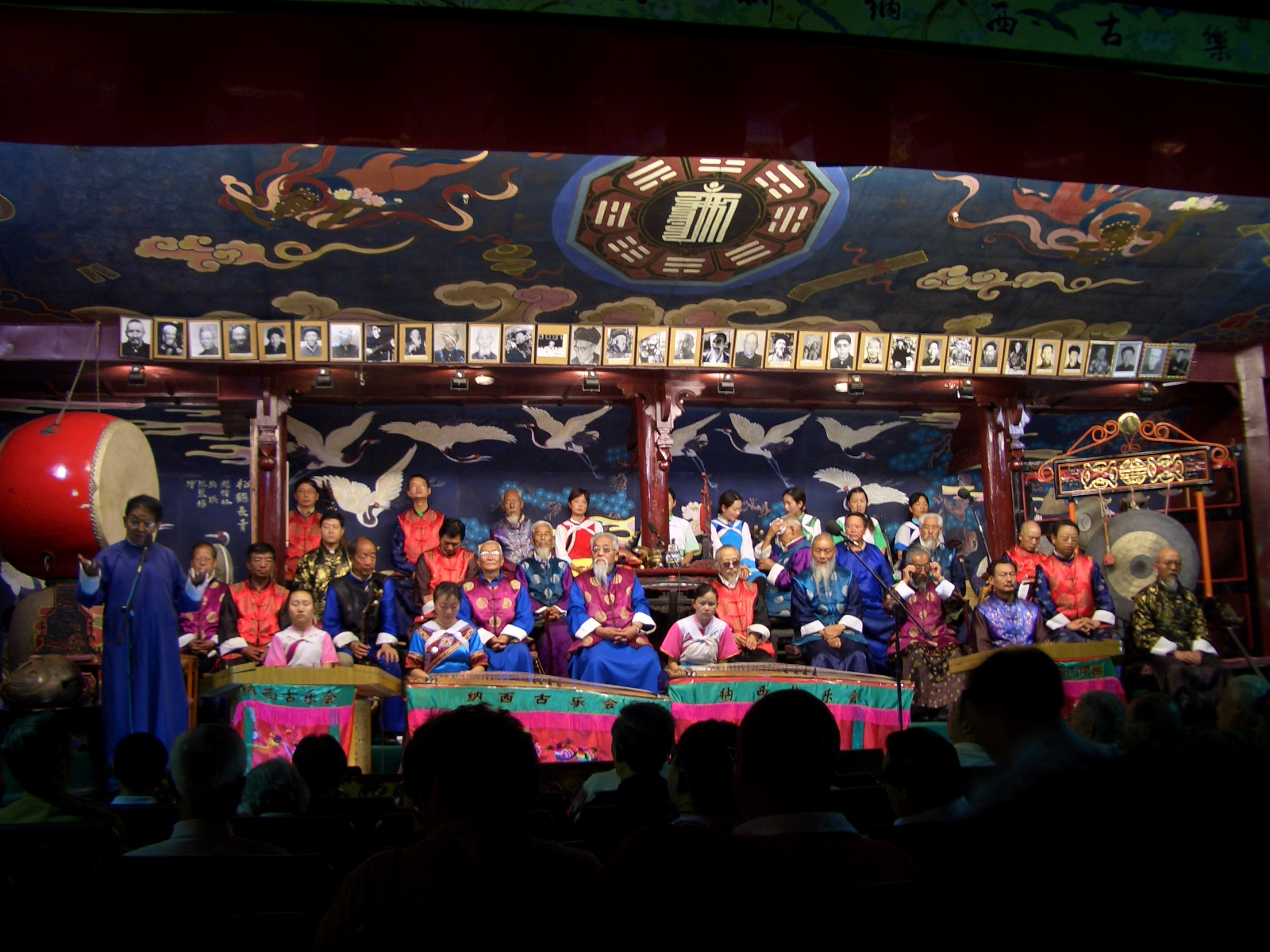 東巴樂曲 雲南 麗江 YUNNAN LIJIANG CHINESE MUSIC